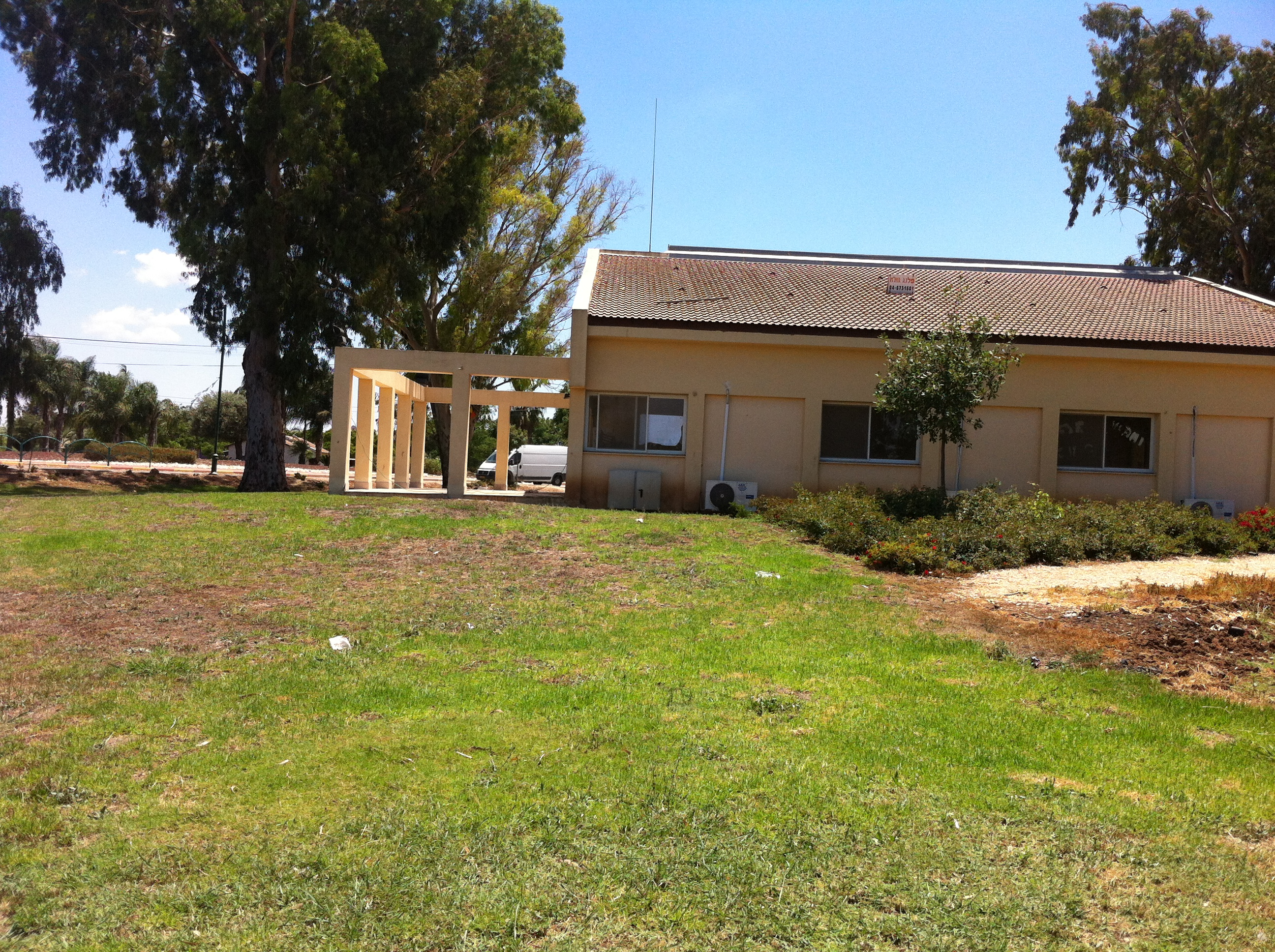 מועדון המושב